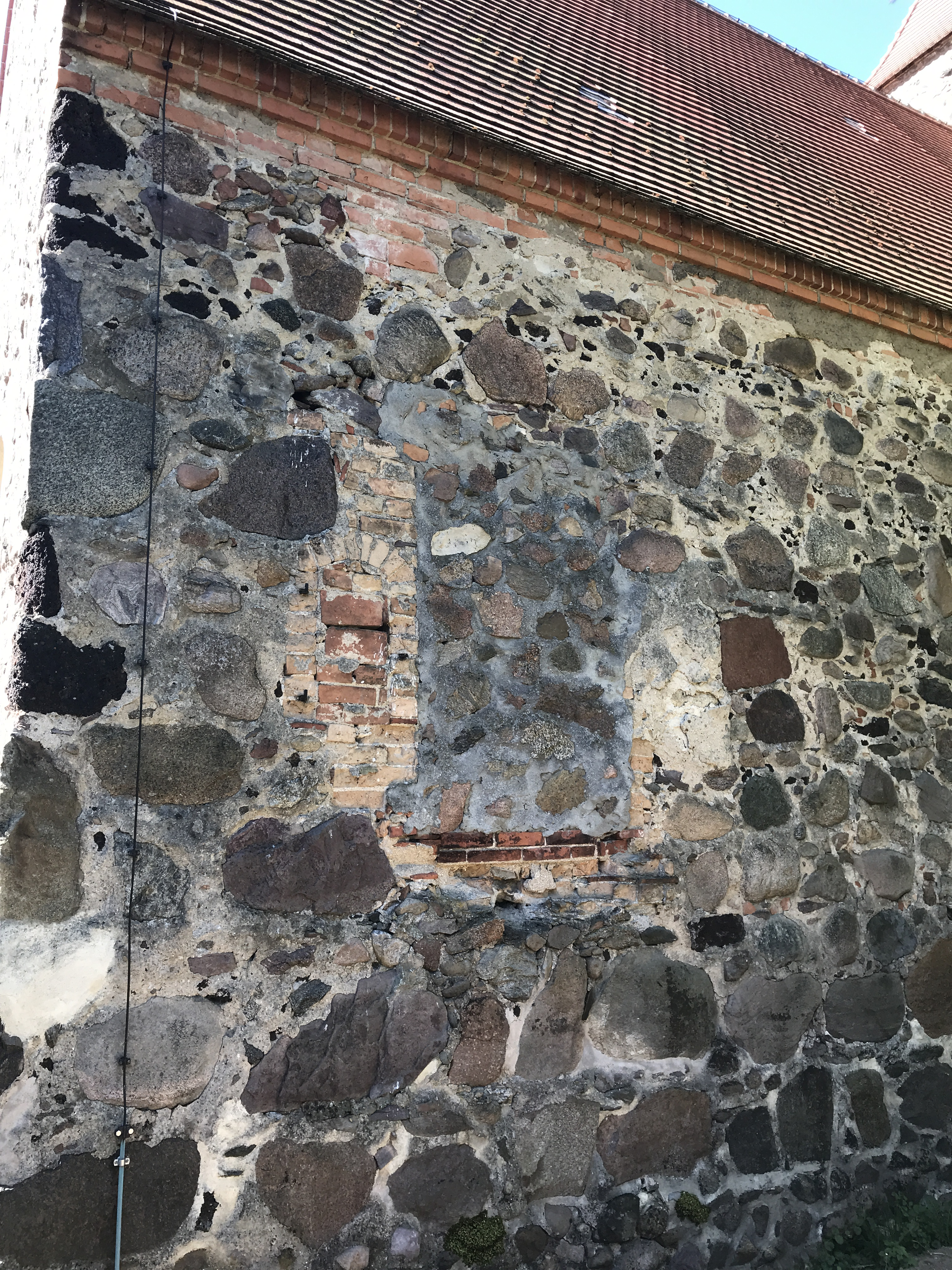 Die Dorfkirche Drahnsdorf im Landkreis Dahme-Spreewald entstand in der ersten Hälfte des 15. Jahrhunderts. Im Innern steht unter anderem eine hölzerne Kanzel aus dem Anfang des 18. Jahrhunderts.